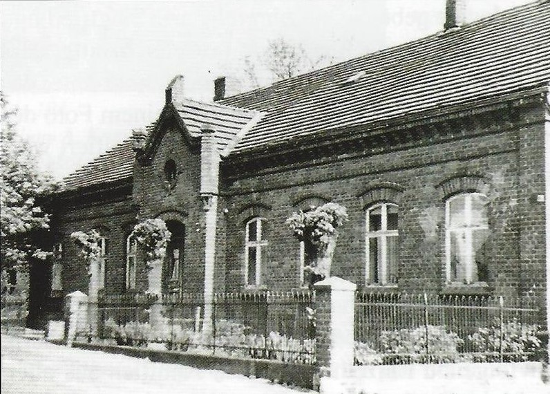 Fotografie des Ganzliner Bauernhauses (gegenüber der Kirche), in dem ein Regimentskommandeur der Roten Armee Ende April 1945 Quartier machte.